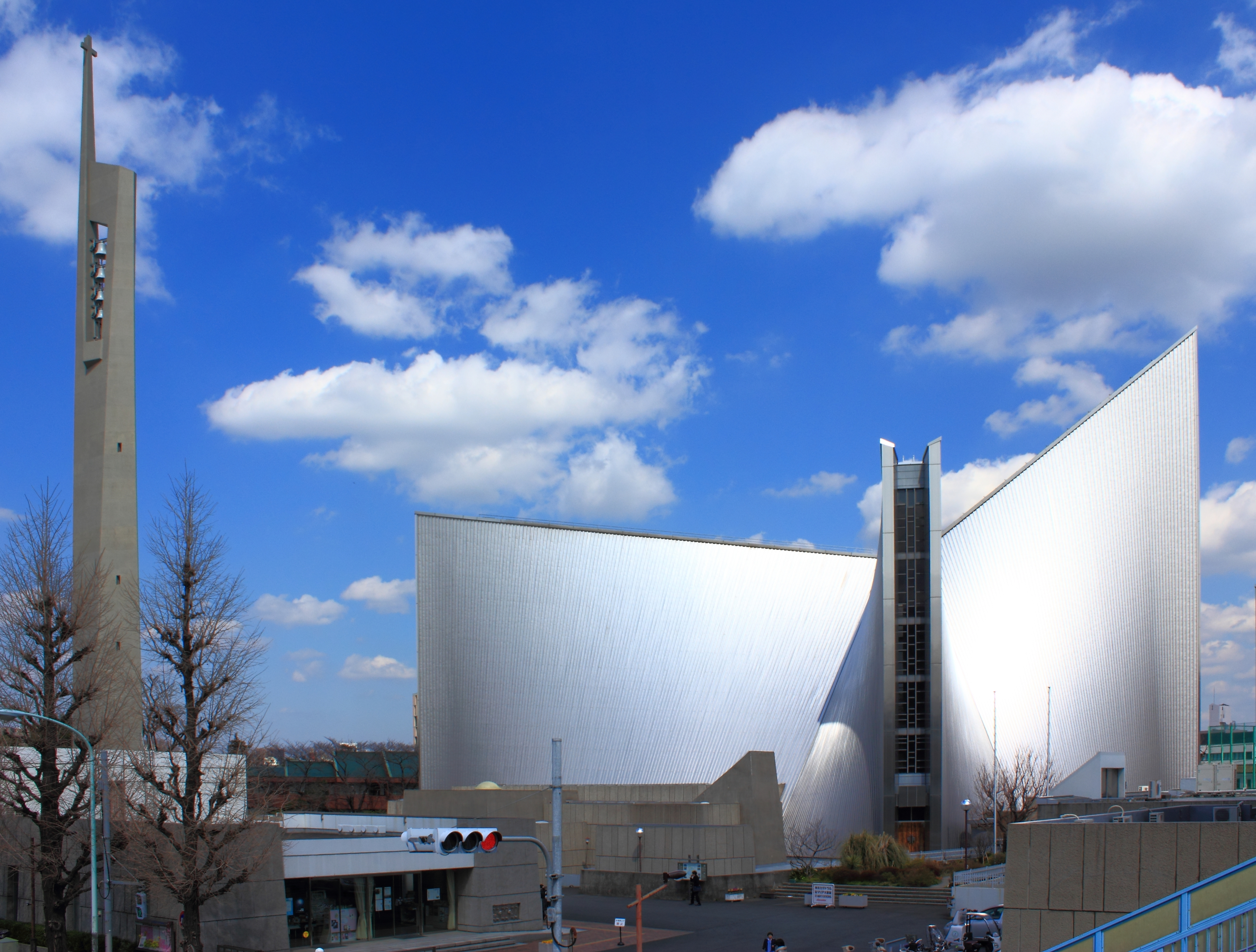 東京カテドラル聖マリア大聖堂（東京都文京区）、 Tange Kenzo.